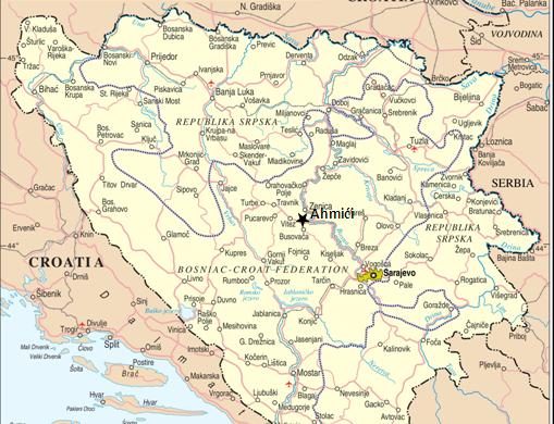 Situación de Ahmici en Bosnia y Herzegovina